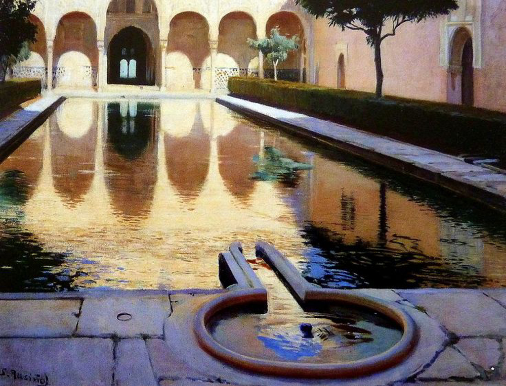 El patio de la Alberca (Granada) (1895), de Santiago Rusiñol, colección particular.